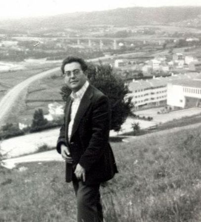 Manuel Rodríguez López en el Parque de Rosalía de Castro (de Lugo)